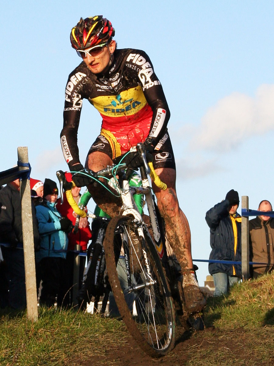 Bart Wellens tijdens de Noordzeecross 2007 in Middelkerke